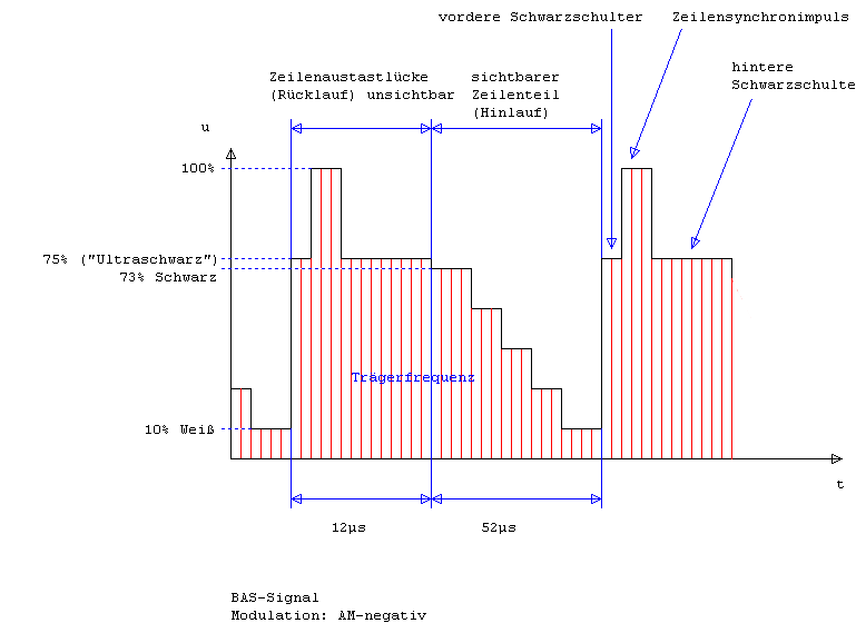 BAS-Signal